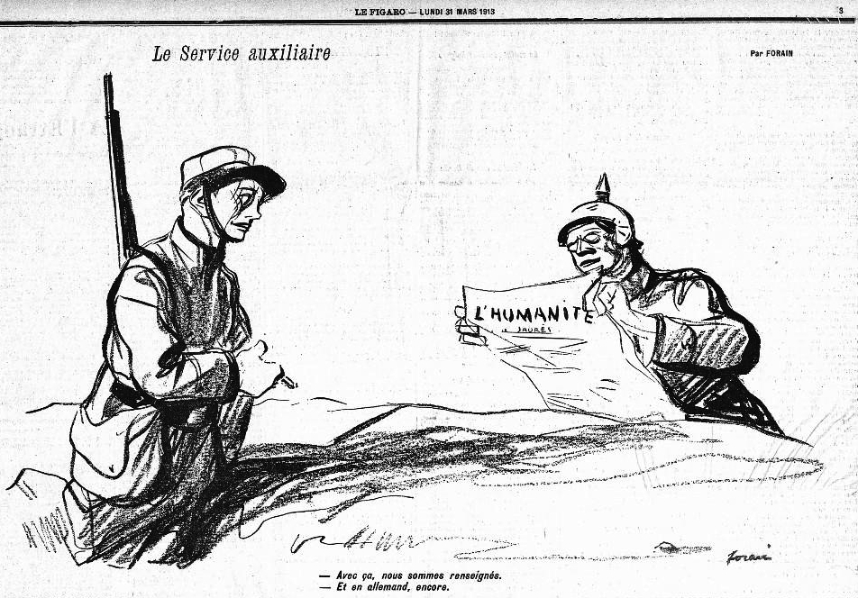 Dessin de Jan-Louis Forain dans le Figaro du 31 mars 1913